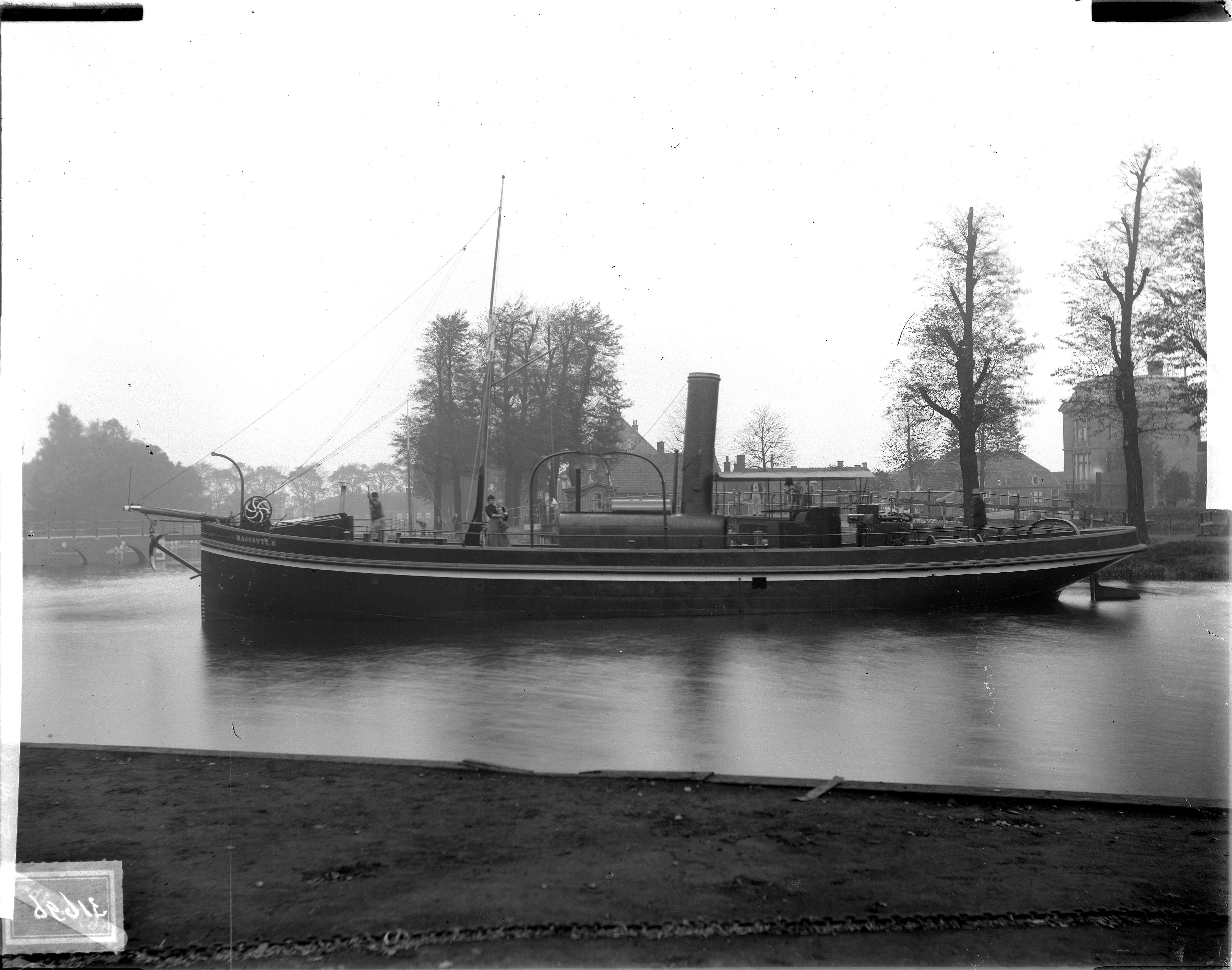 Zuidsingel 66, Koninklijke Nederlandse Grofsmederij. Stoomsleepboot ""Mascotte II"" van het fabrieksterrein over de Zijlsingel naar de Schrijversbrug over de Oude Rijn gezien.